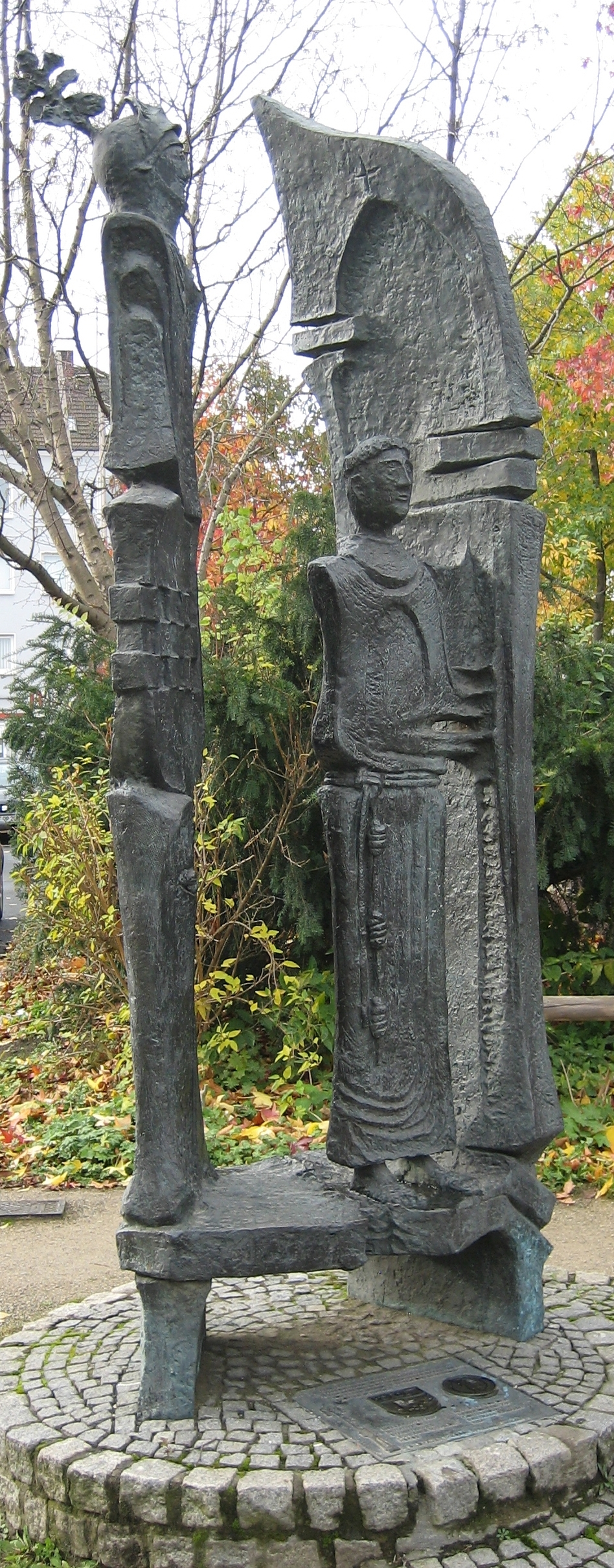 Denkmal Konrad von der Mark in Dortmund-Hörde